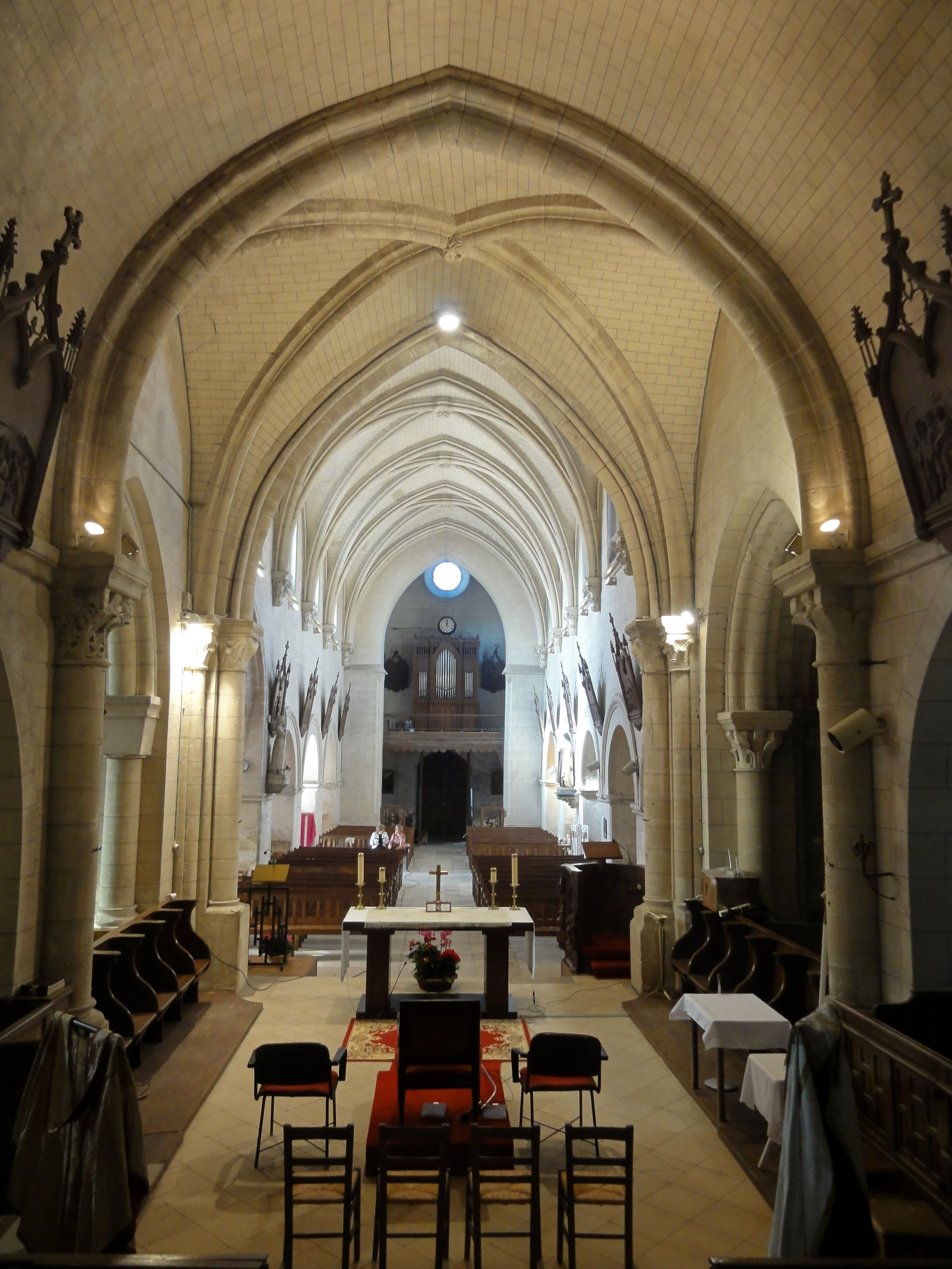 Chœur, 3e travée, vue vers l'ouest.